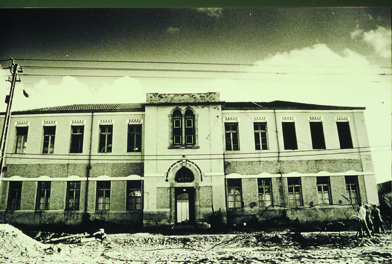 Yerushalmi Building 1989